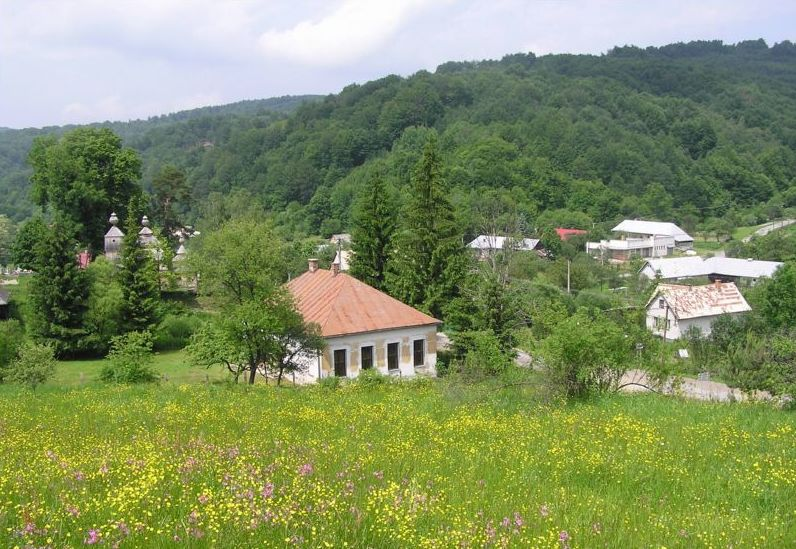 Veduta obce Bodružal. V popredí budova školy, ktorá bola postavená v roku 1900. Výchovno vzdelávací proces bol v škole vykonávaný až do roku 1973. Dnes v nej sídli obecný úrad a veriaci pravoslávnej cirkvi majú svoju modlitebňu. V pozadí budova bývalej predajne Jednotného ľudového spotrebného družstva v Bodružale, dnes je nefunkčná.